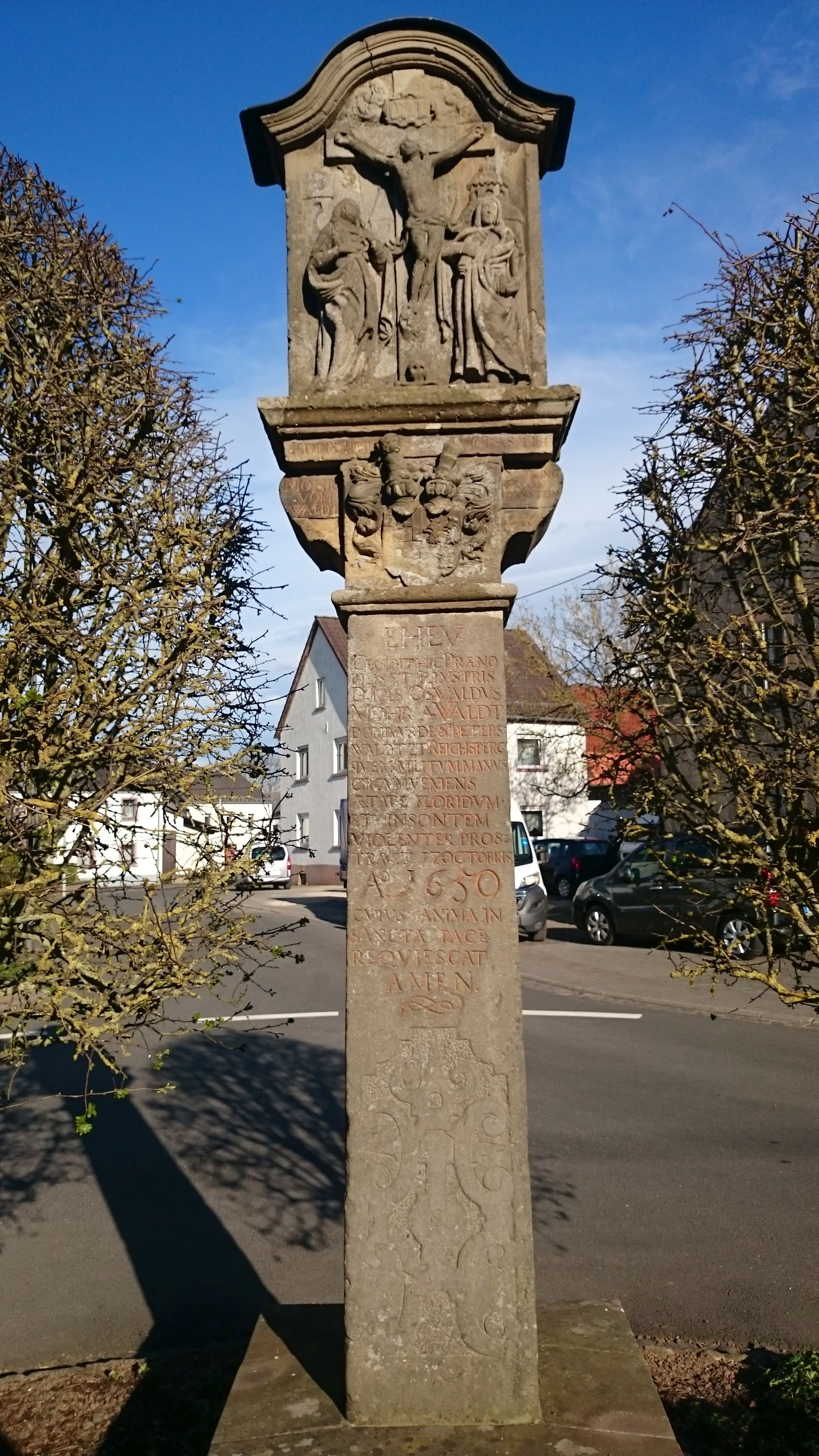 Bildstock Wiesbaum